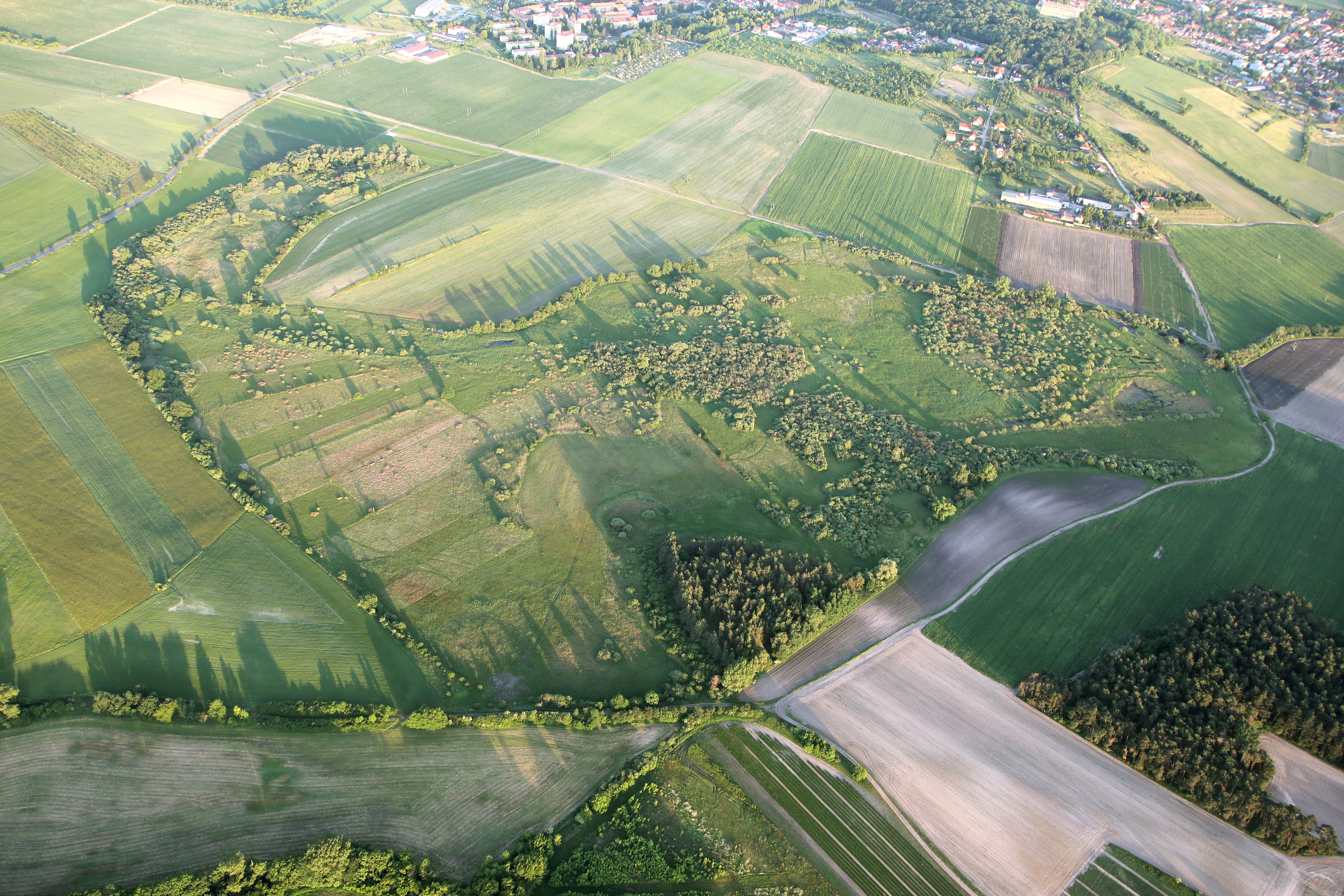 letecký snímek